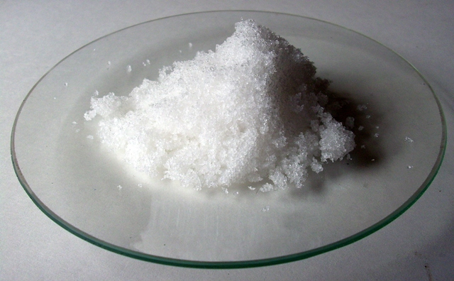 NaNO3